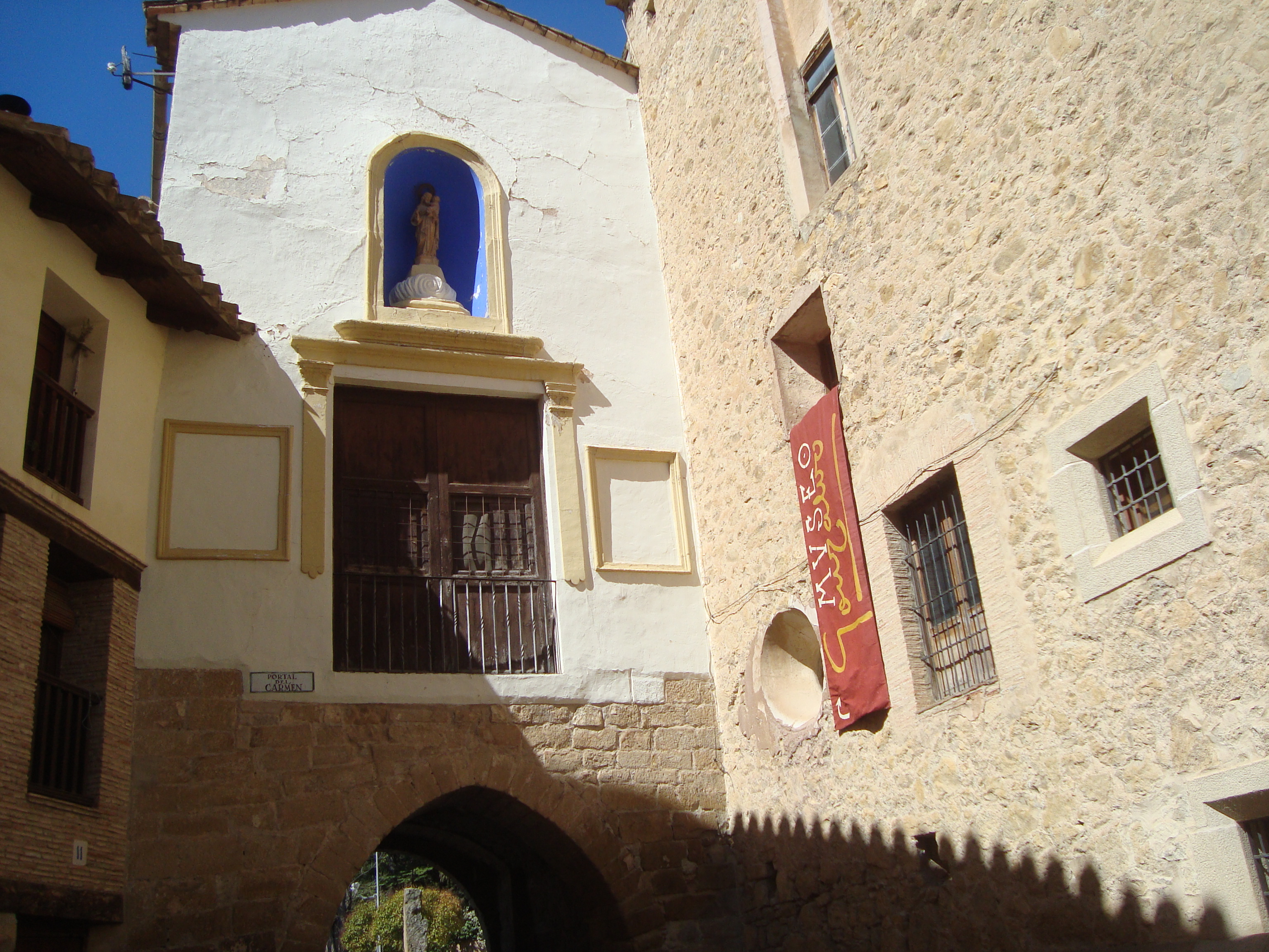 Portal y capilla de la Virgen del Carmen (Rubielos de Mora)